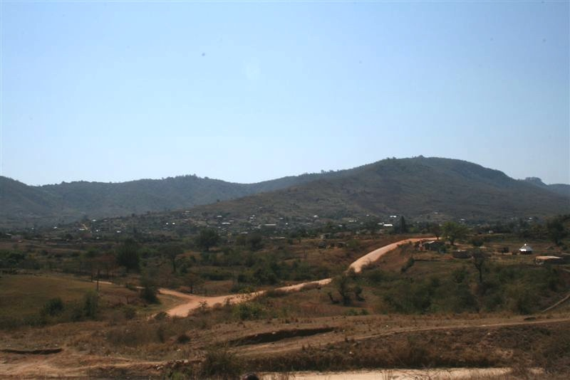 Buysdorp